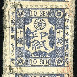 Japanese fiscal stamp